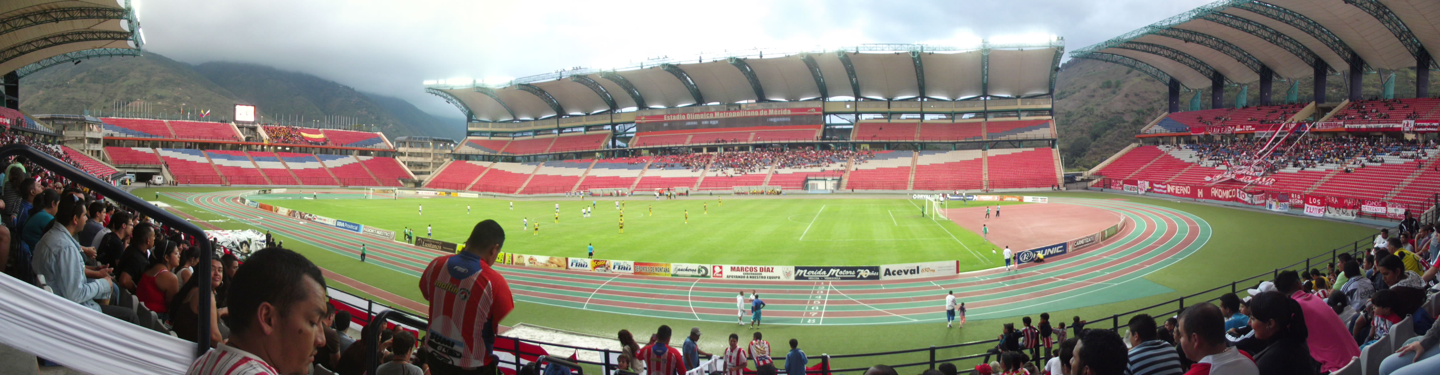 Fotografía panorámica del Estadio Olímpico Metropolitano de Mérida en un partido del Estudiantes de Mérida F.C.